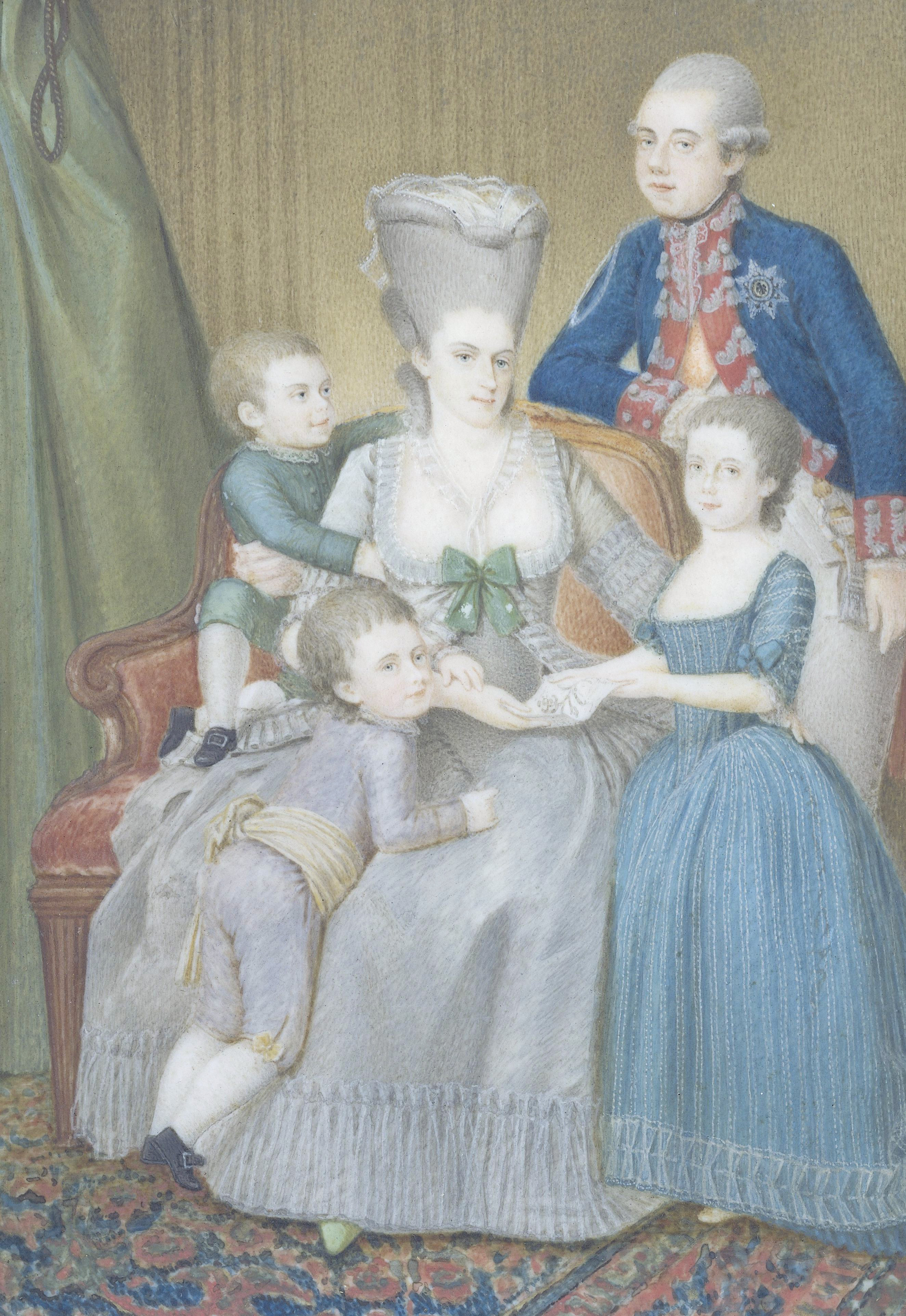 Willem V (1748-1806), prins van Oranje-Nassau, met zijn vrouw Frederika Sophia Wilhelmina van Pruisen en hun kinderen Frederica Louisa Wilhelmina, Willem Frederik en Willem George Frederik